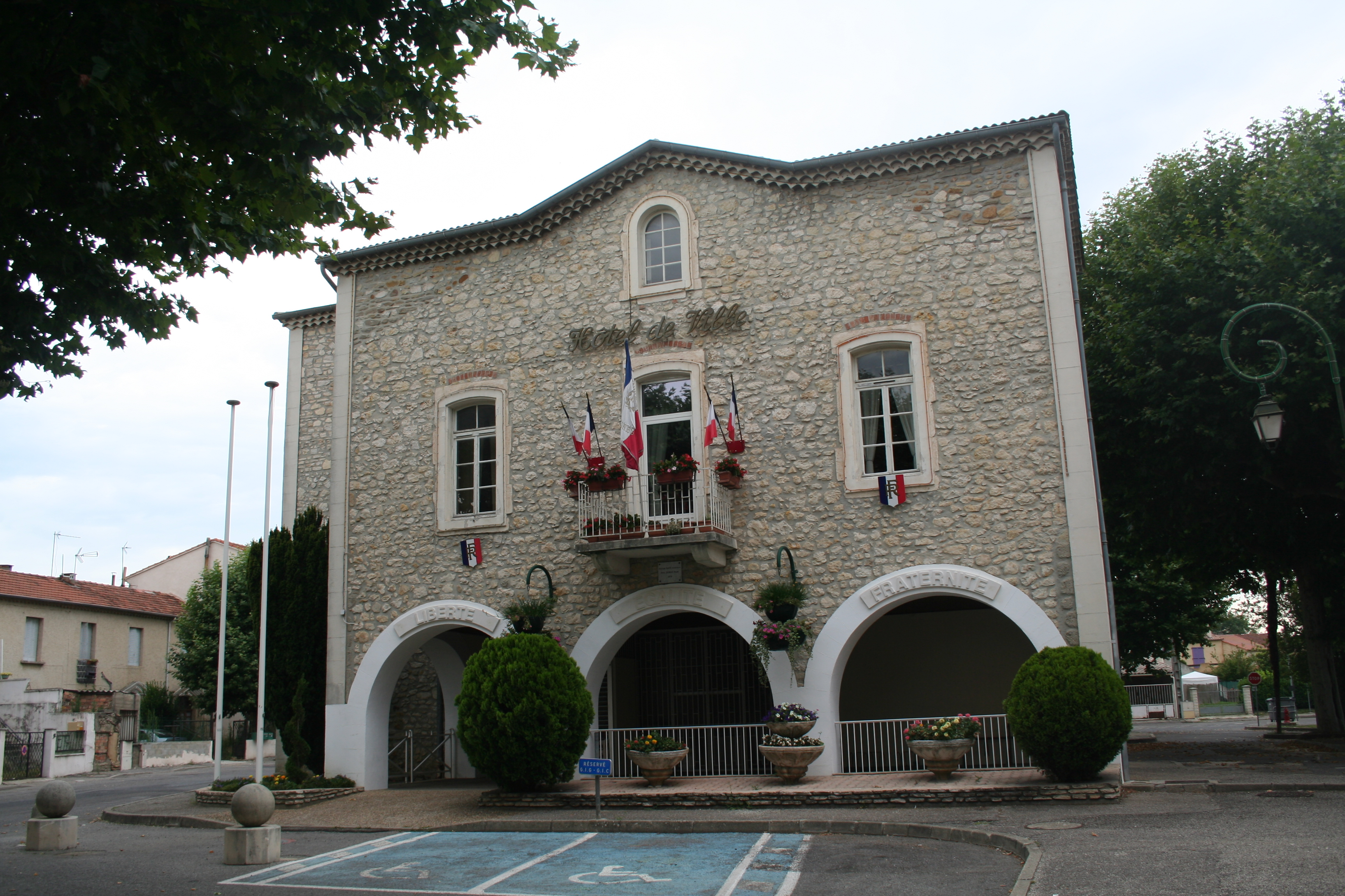 Salindres (Gard) - mairie